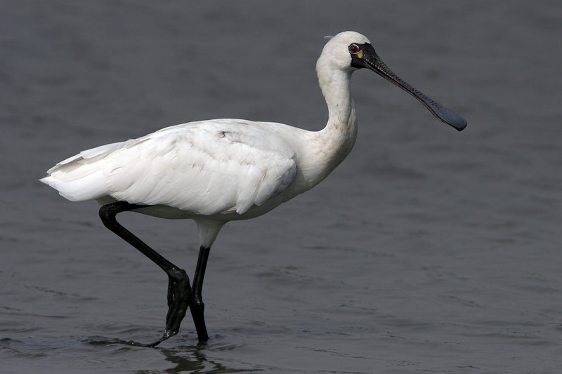 粵語: 朋友送的相片！